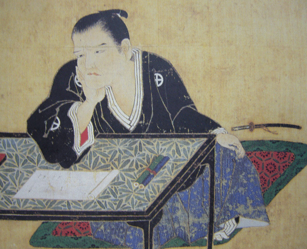 島津斉興像